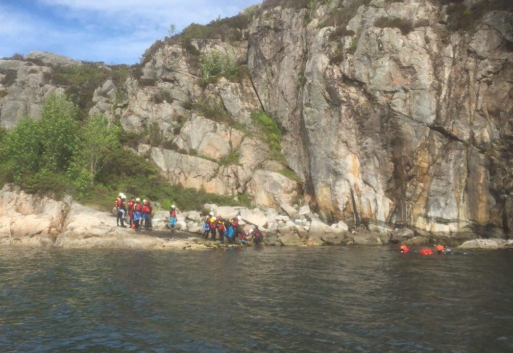 Coasteering i Austefjorden, Sund kommune